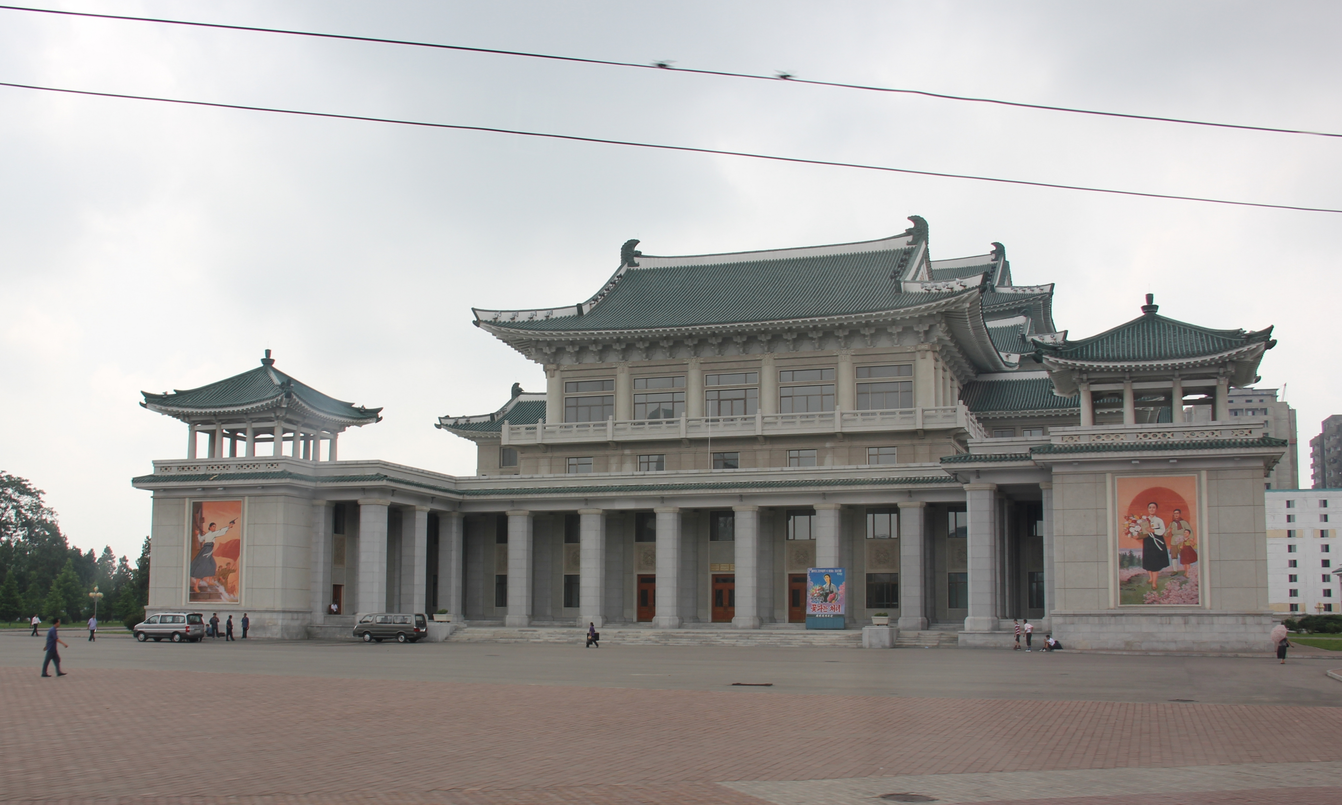 Pyongyang Grand Theater